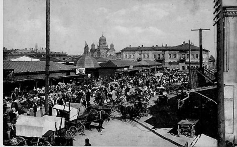 г. Иркутск. Мелочный базар.